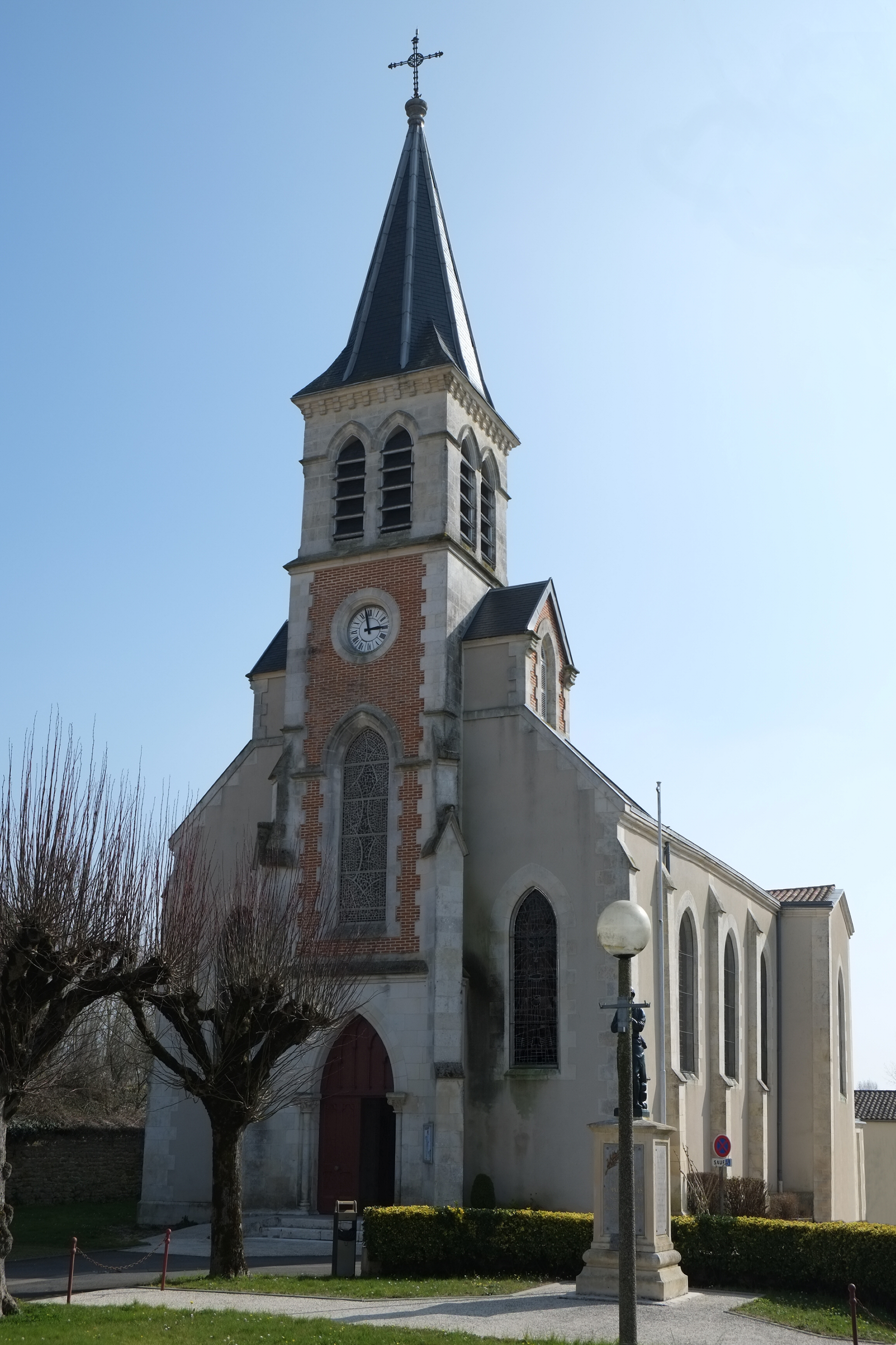 Église Saint-Germain à Saint-Germain-de-Marencennes Charente-Maritime France